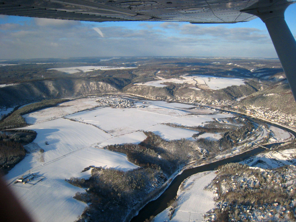 Zákruta Berounky mezi Zbečnem a Újezdem nad Zbečnem.